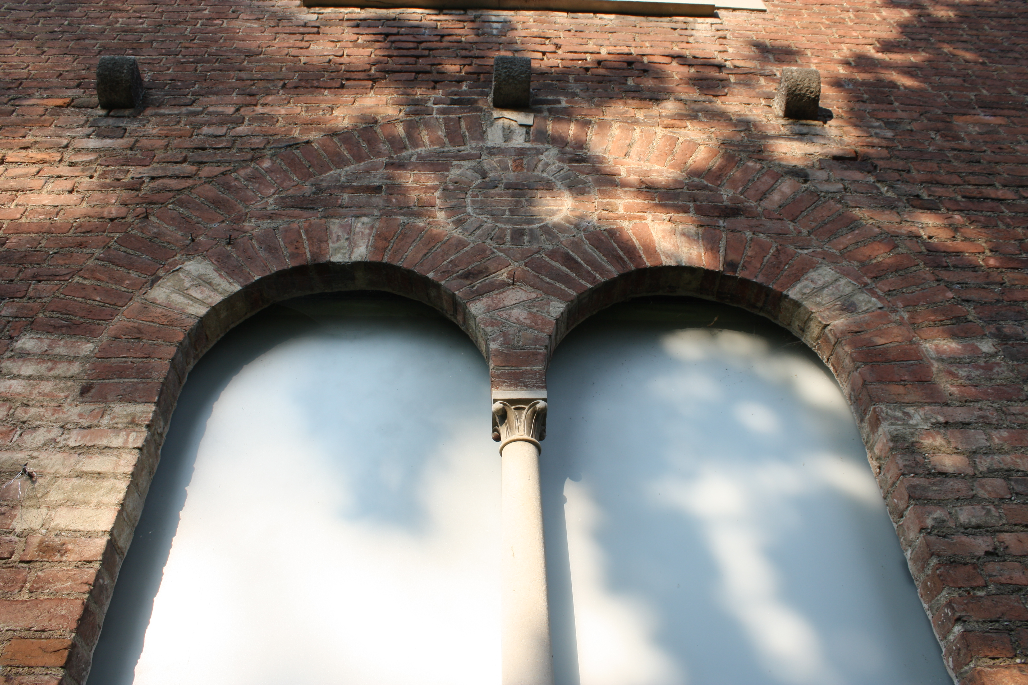 Palazzo Leone da Perego a Legnano: una bifora del piano terra This is a photo of a monument which is part of cultural heritage of Italy.